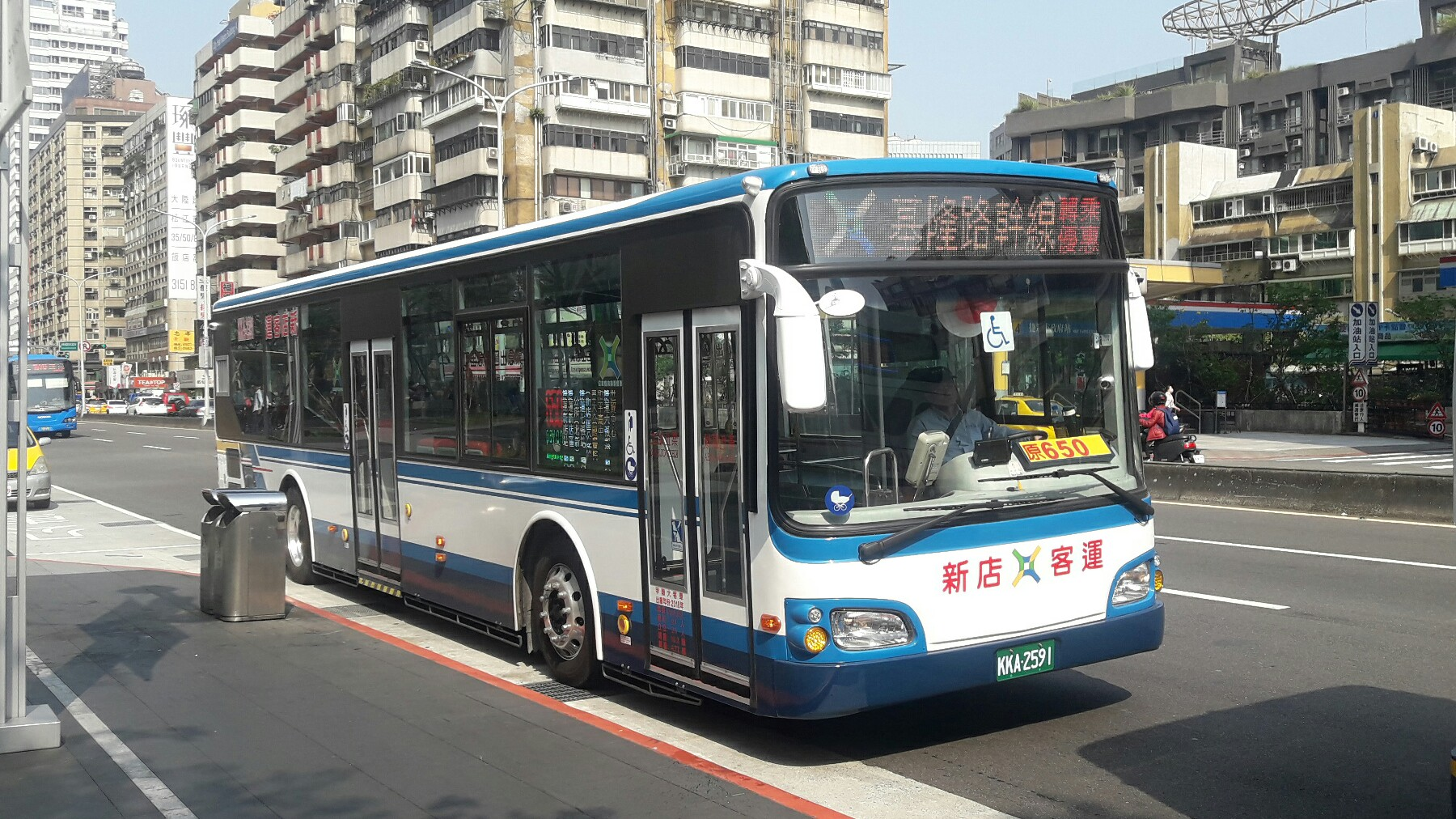 新店客運2018年份日野HS8JRVL-UTF大客車KKA-2591，行駛臺北市聯營公車基隆路幹線。